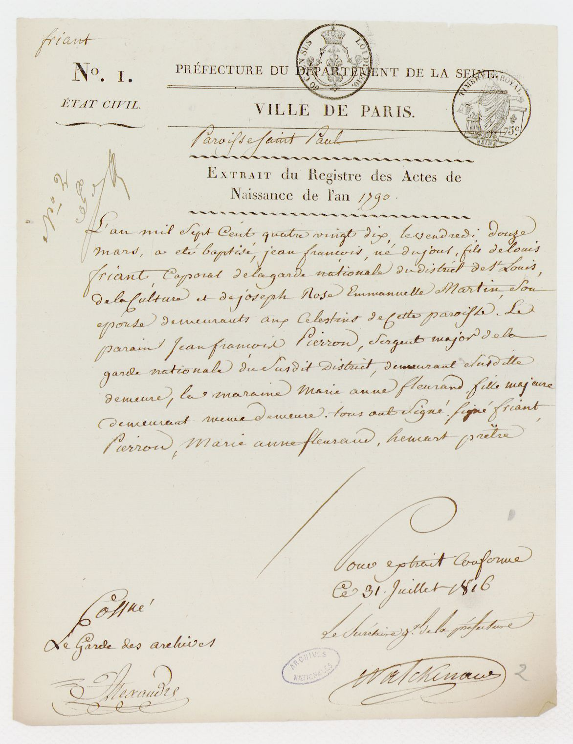 Copie d'acte de baptême de Jean-François Friant, provenant de son dossier de Légion d'honneur, Archives nationales, LH/1037/86